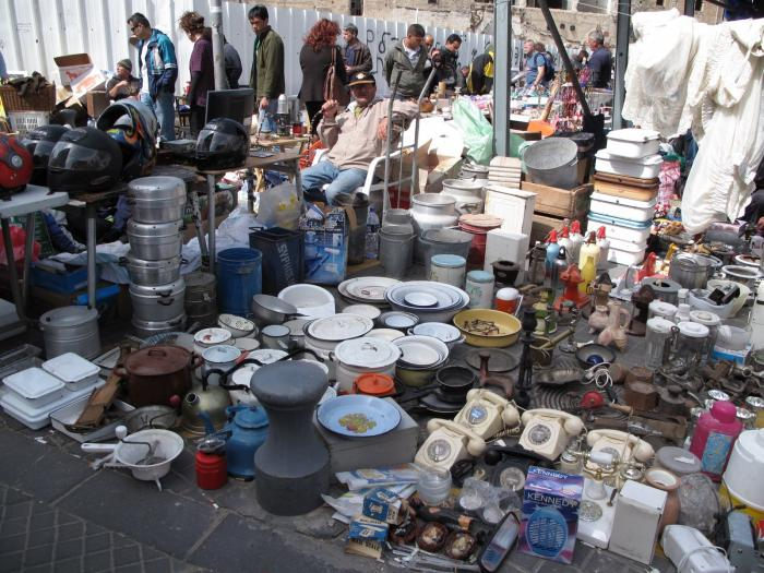 שוק הפשפשים ביפו